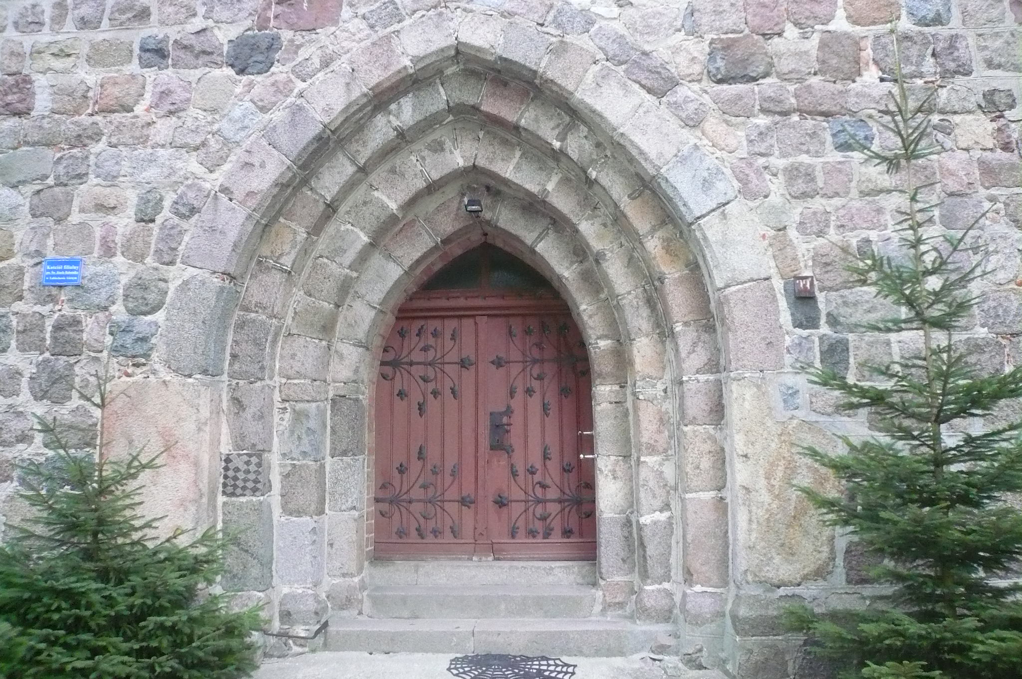 Portal główny kościoła filialnego p.w. św. Józefa Robotnika w Lubiechowie Górnym w woj. zachodniopomorskim z widocznym znakiem szachownicy 08.1956.